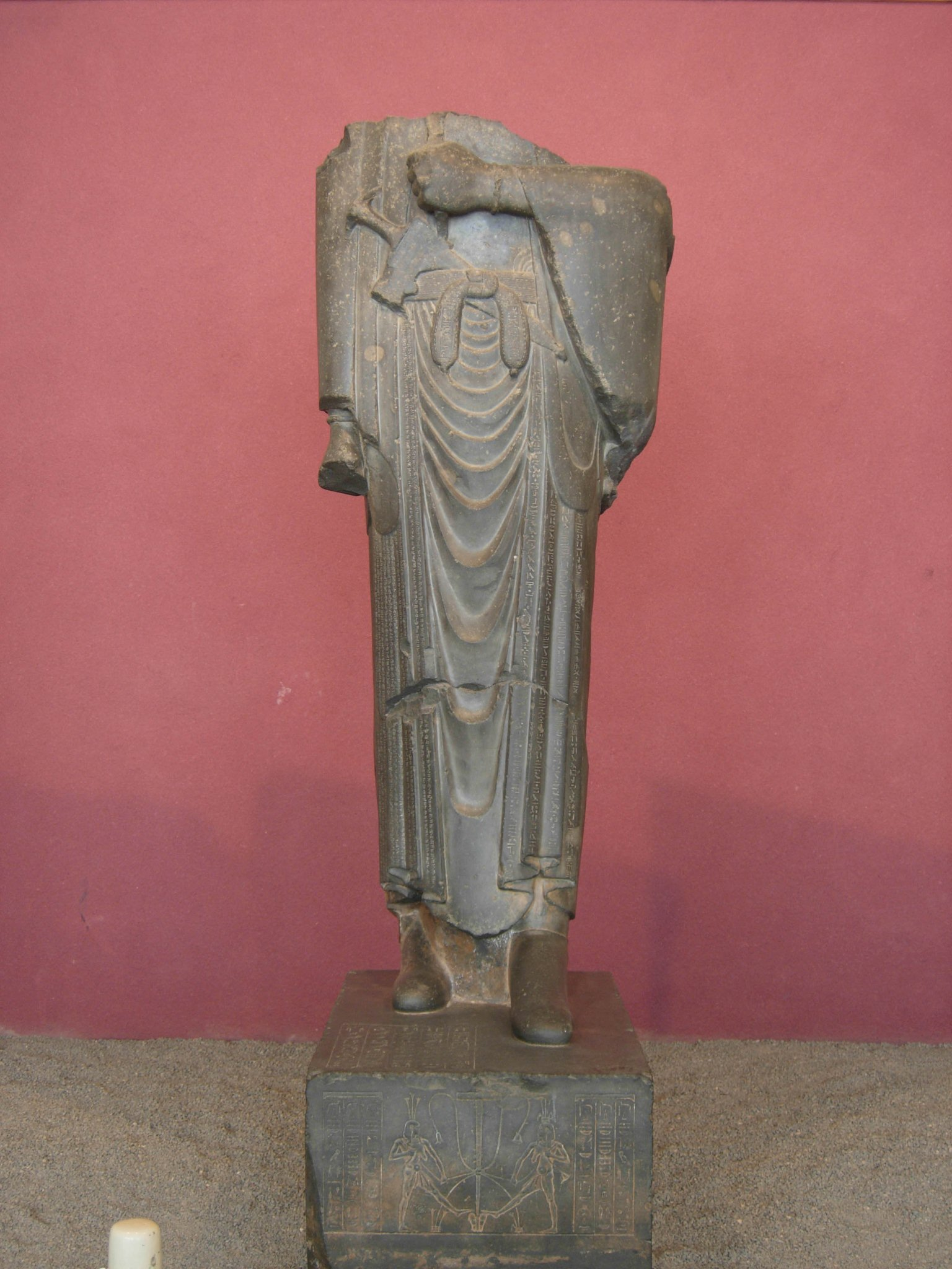 31739-Tehran